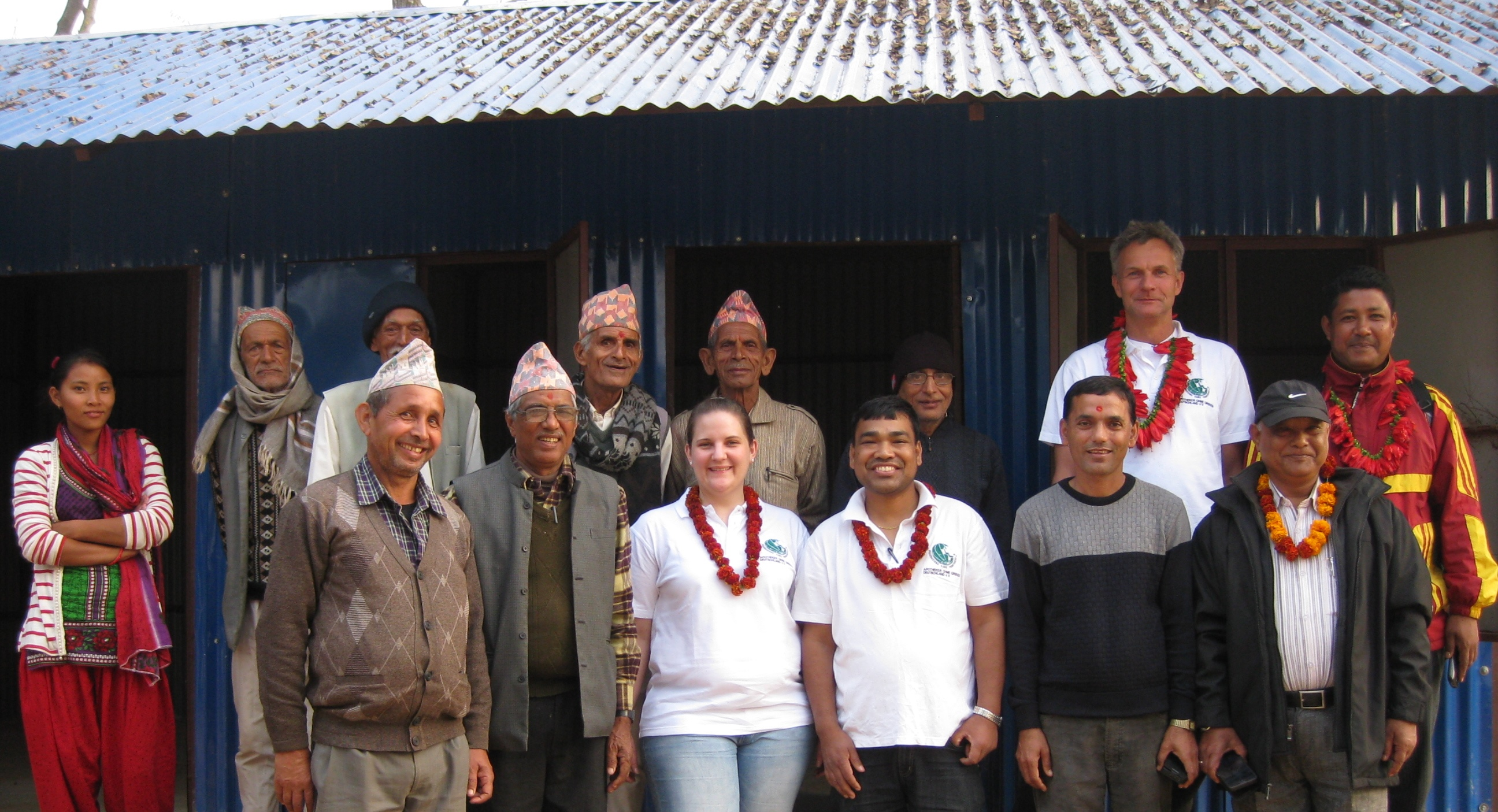 Bei der Übergabe-Zeremonie des zweiten Gesundheitspostens in Dhuwakot, Ghorka-Distrikt, waren von AoG Bianca Schäfer (vorne mittig im weißen AoG-Poloshirt) und Ralph Bültmann (hinten rechts im weißen AoG-Poloshirt) dabei.